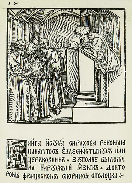 Скарына. "Ісус Сірахаў", 5 снежня 1517 г. (ліст 1). 10,5 Х 10,6